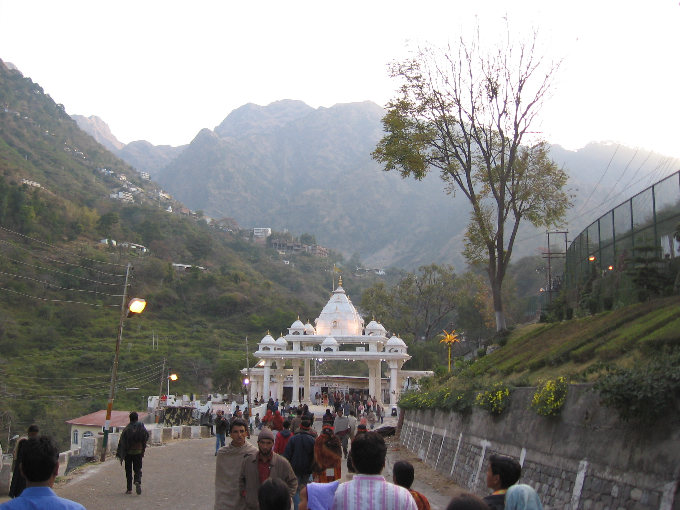 Vaishno Devi Entrance